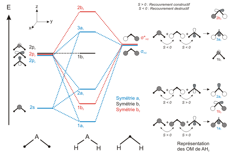 Diagramme des niveaux d'énergie des OM d'une molécule AH2 de géométrie coudée